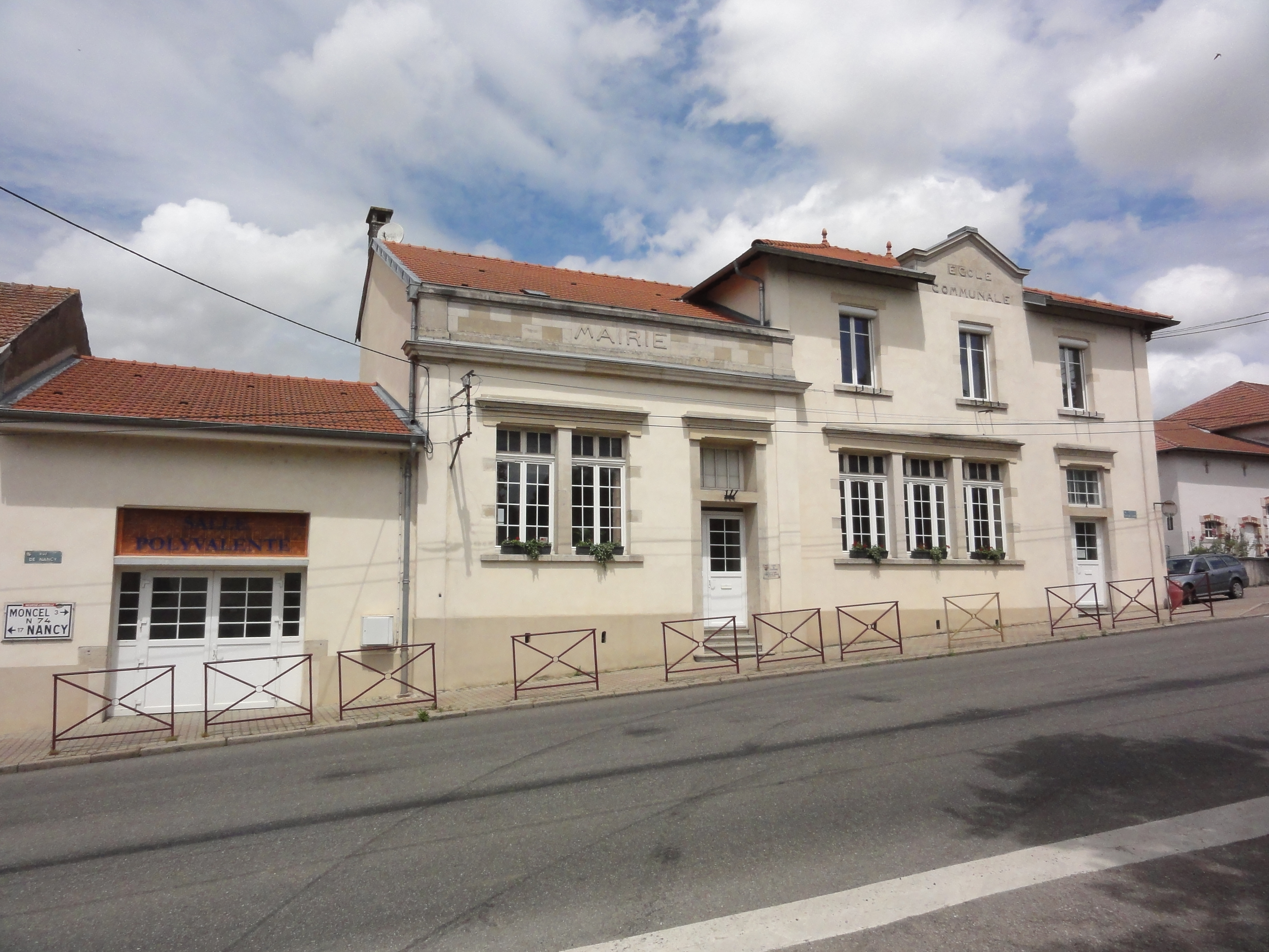 Mazerulles (M-et-M) mairie, école et salle polyvalente